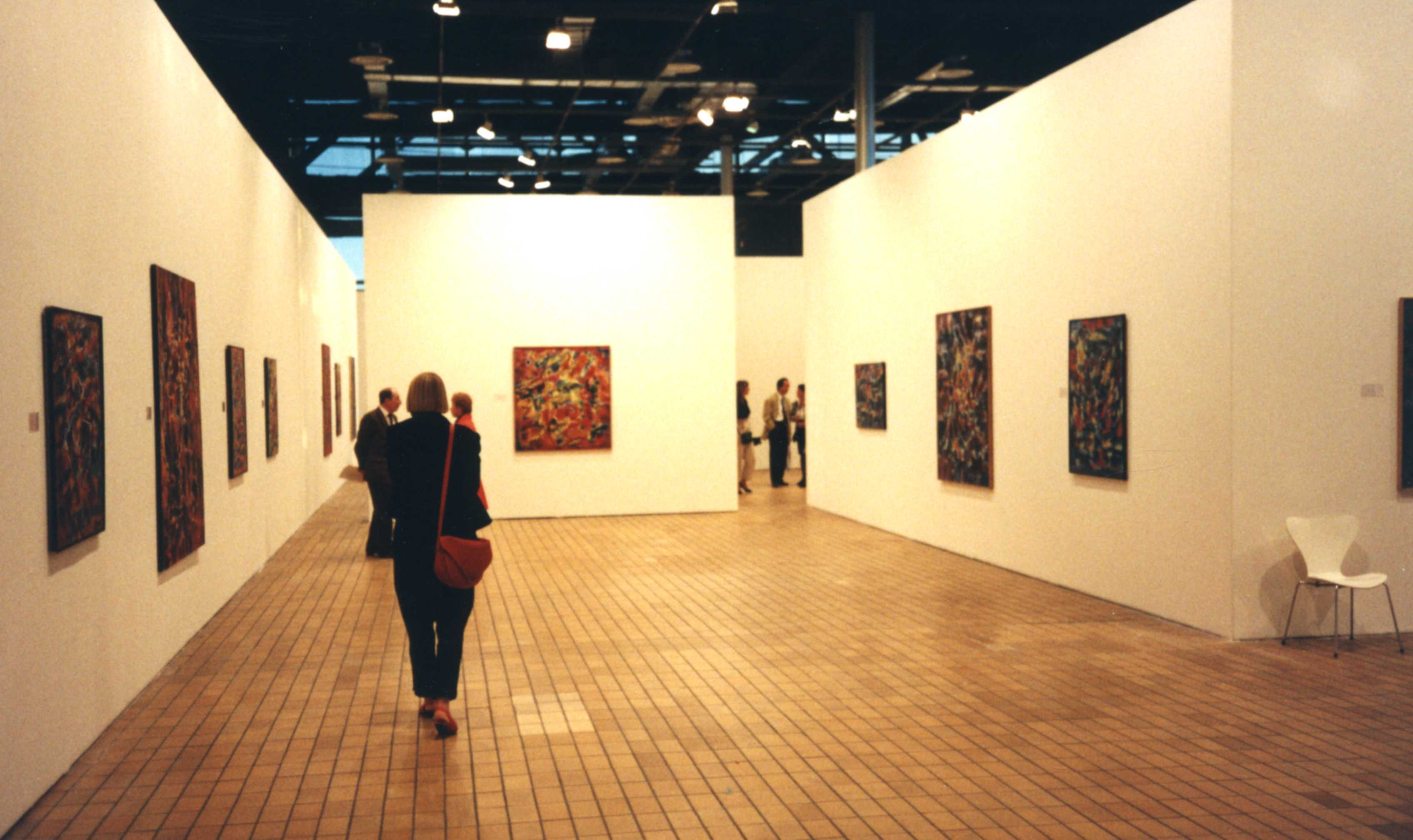 Espace lyonnais d'art contemporain (ELAC), Lyon. Exposition du peintre Jean Le Moal